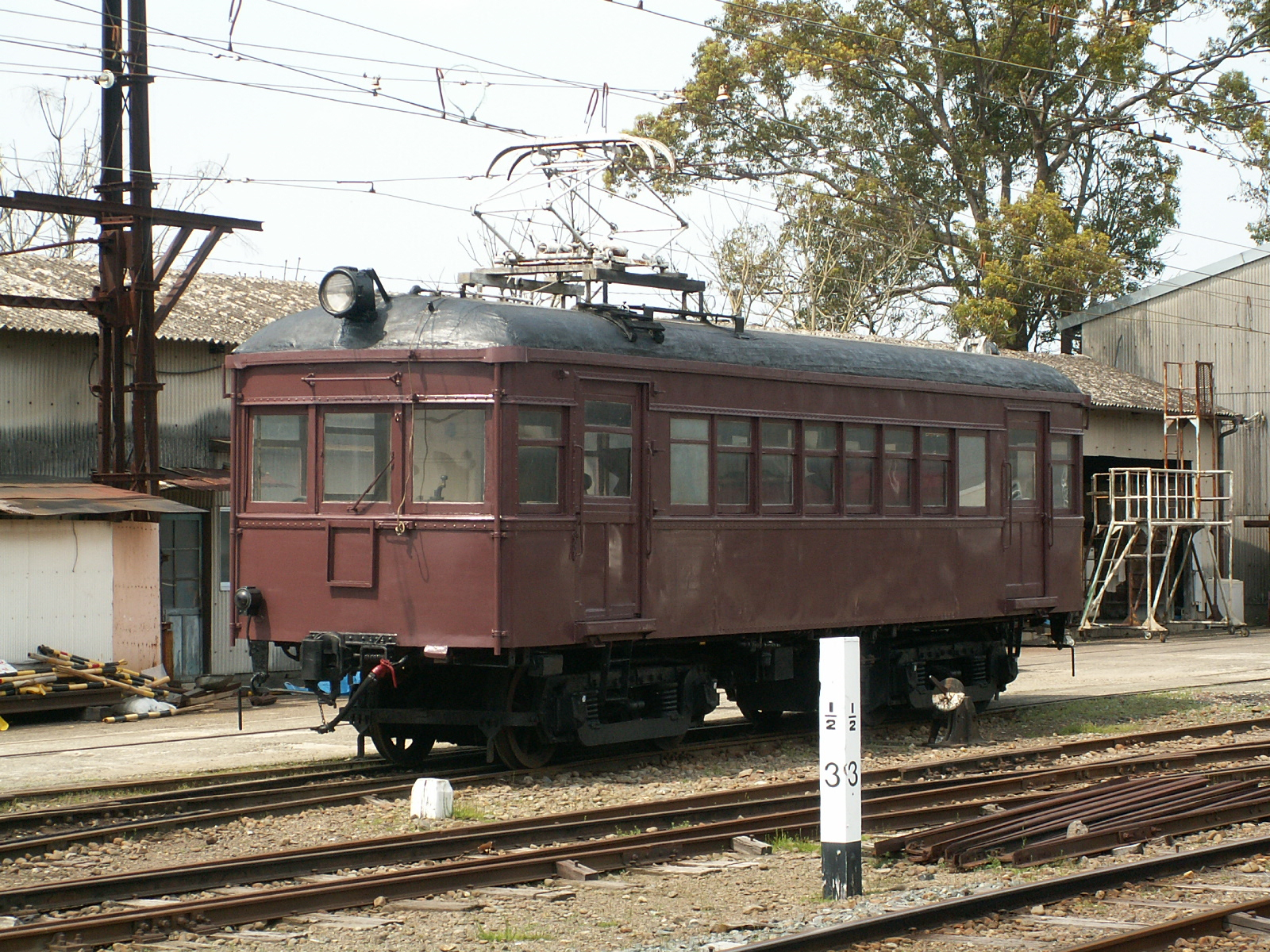 熊本電鉄モハ71形 検査の際に綺麗に修繕されたらしい 2007年3月29日、北熊本駅にて投稿者が許可を得て撮影